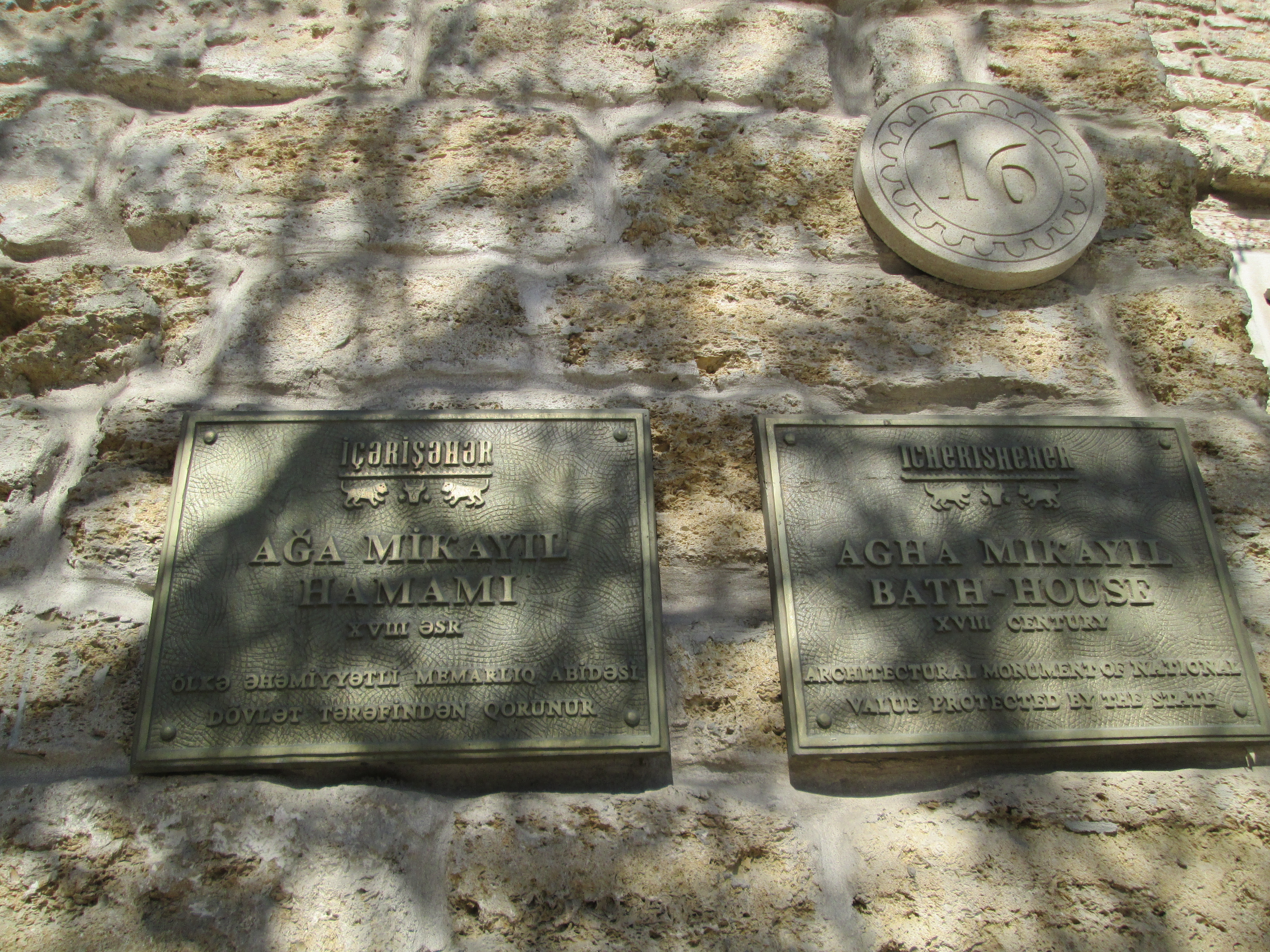 Ağa Mikayıl hamamı məlumat lövhəsi